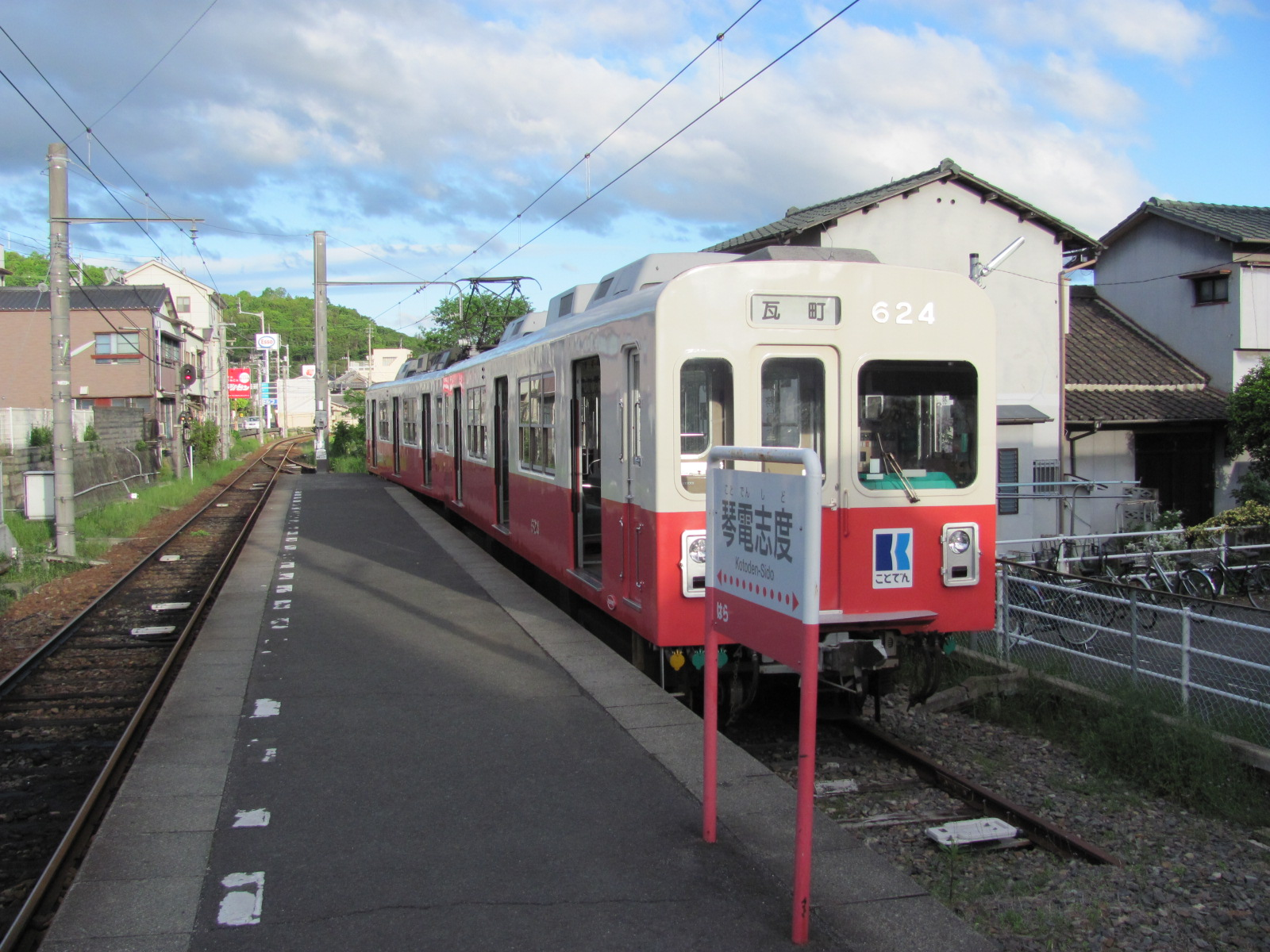 琴電志度駅6時20分発2番電車が短い方のホームに停車中